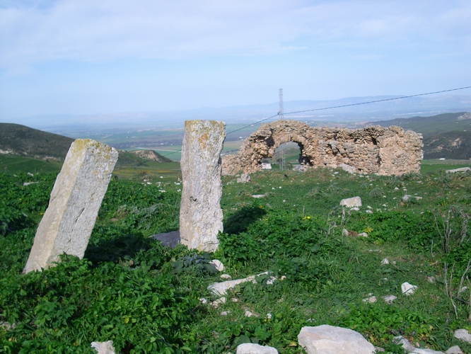 Ruines de Kouchbatia au pied du djebel Gorra